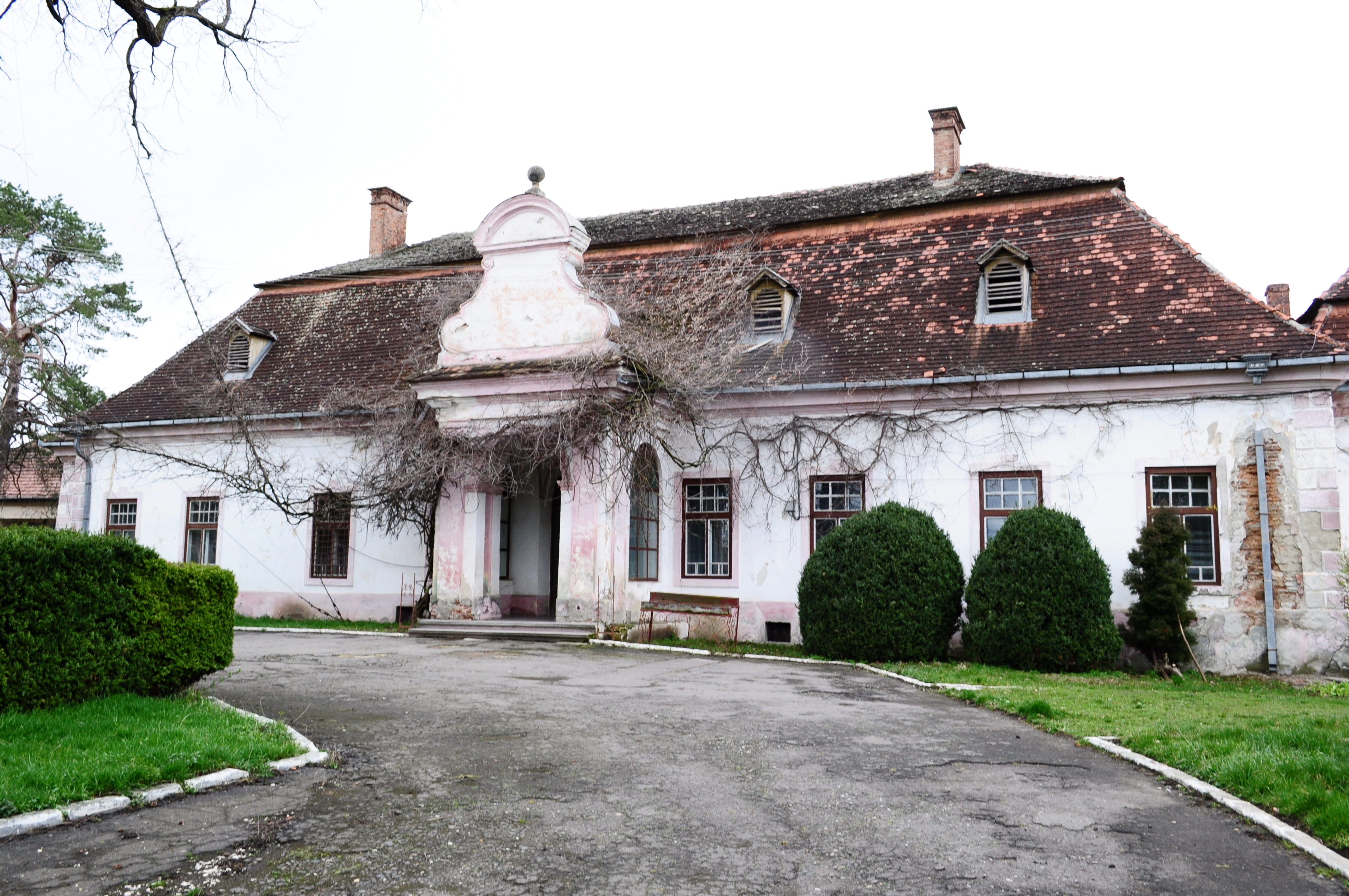 Castelul Rhédei-Rothenthal, Corp A, sat Seuca; comuna Gănești 01